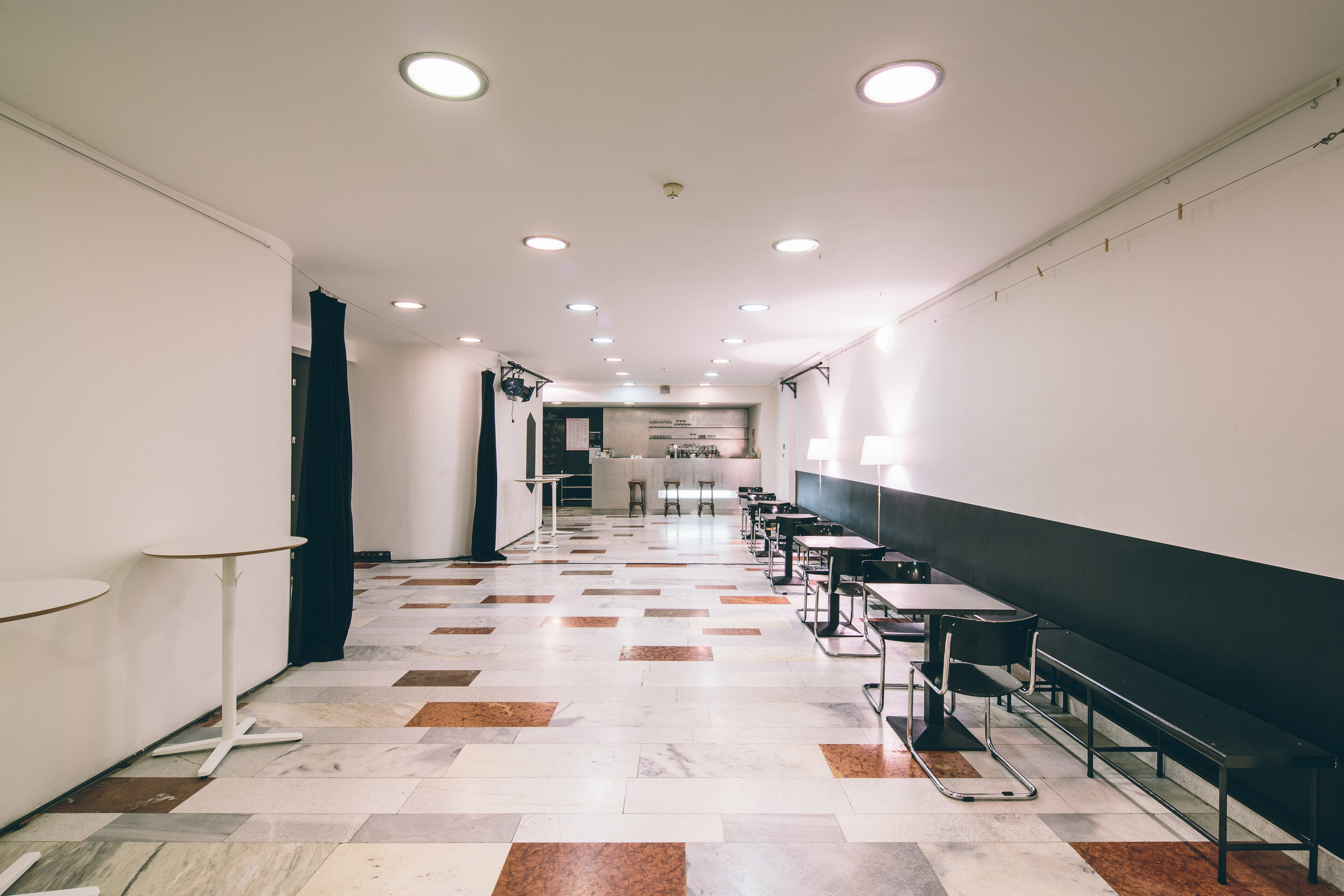 HaDivadlo - foyer